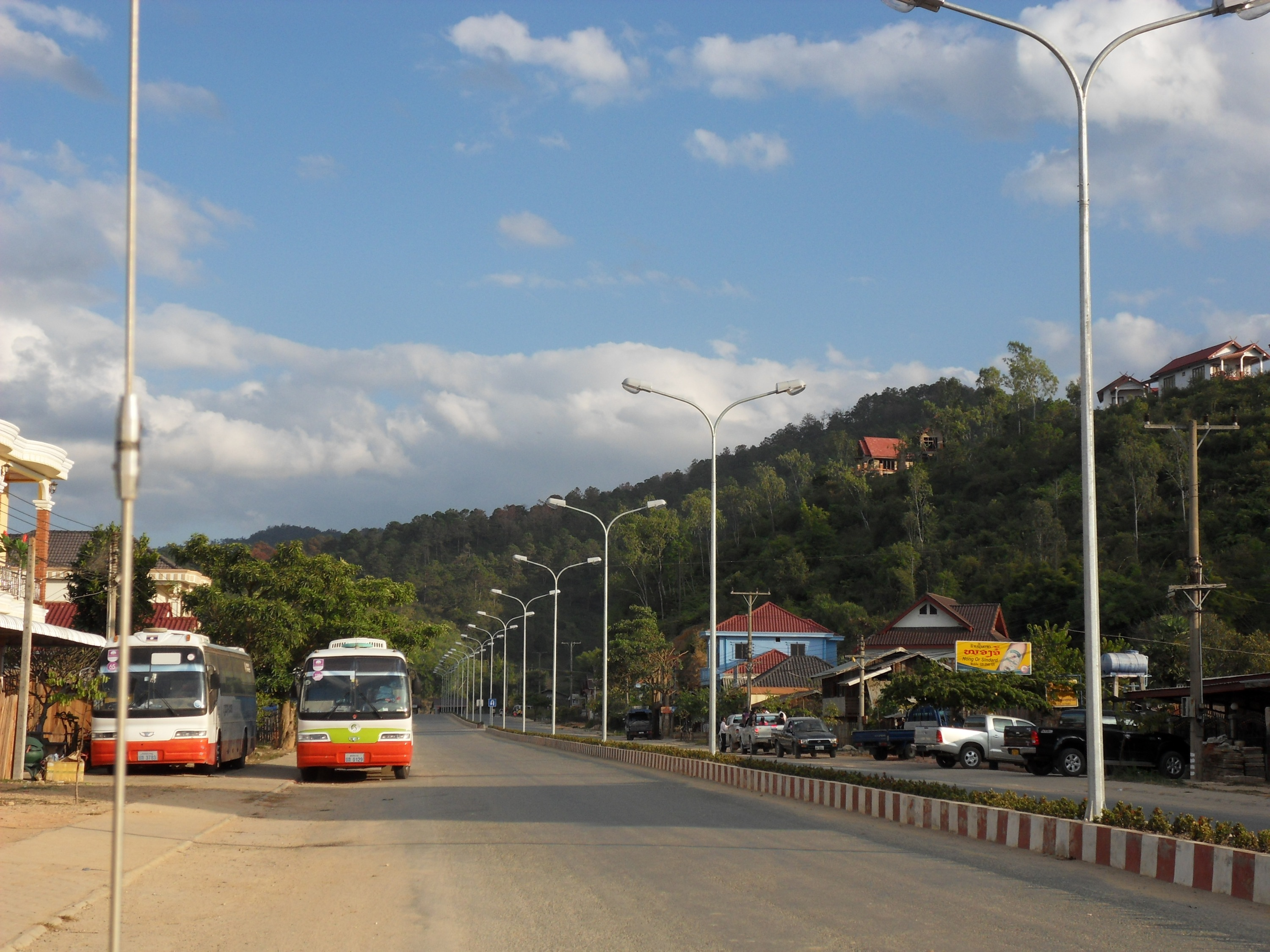 Une avenue de Phonsavane.